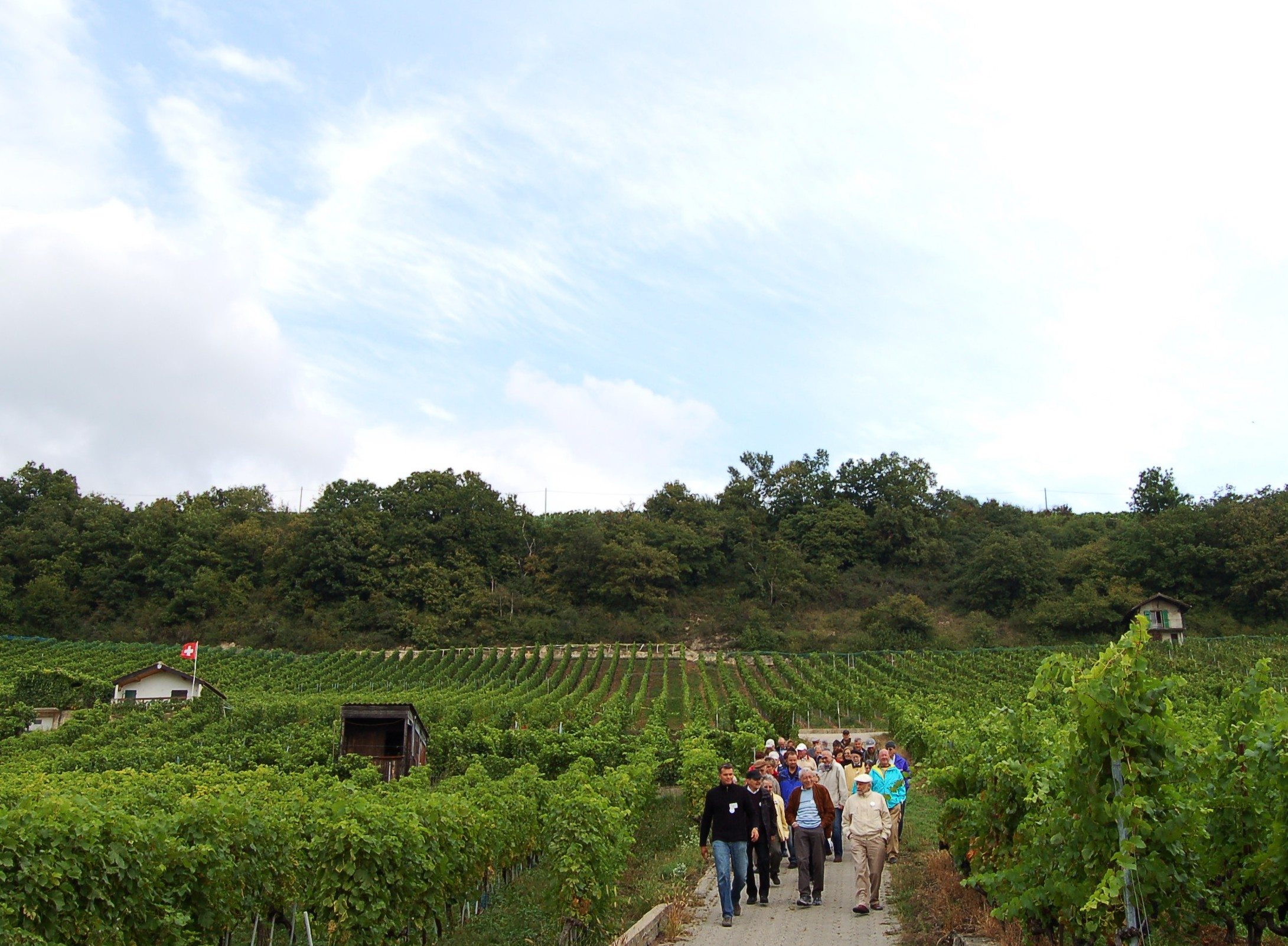 Bürger der partnergemeinde Solothurn 2009 auf Rebbergbesichtigung ob Landeron